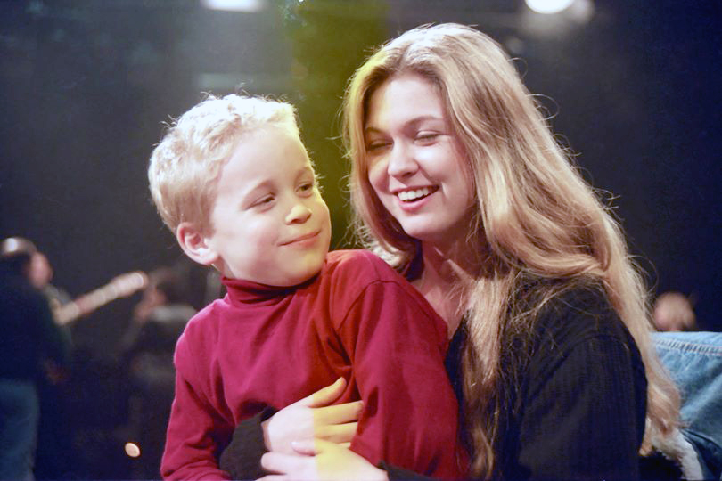 מיכל ינאי בערוץ הילדים